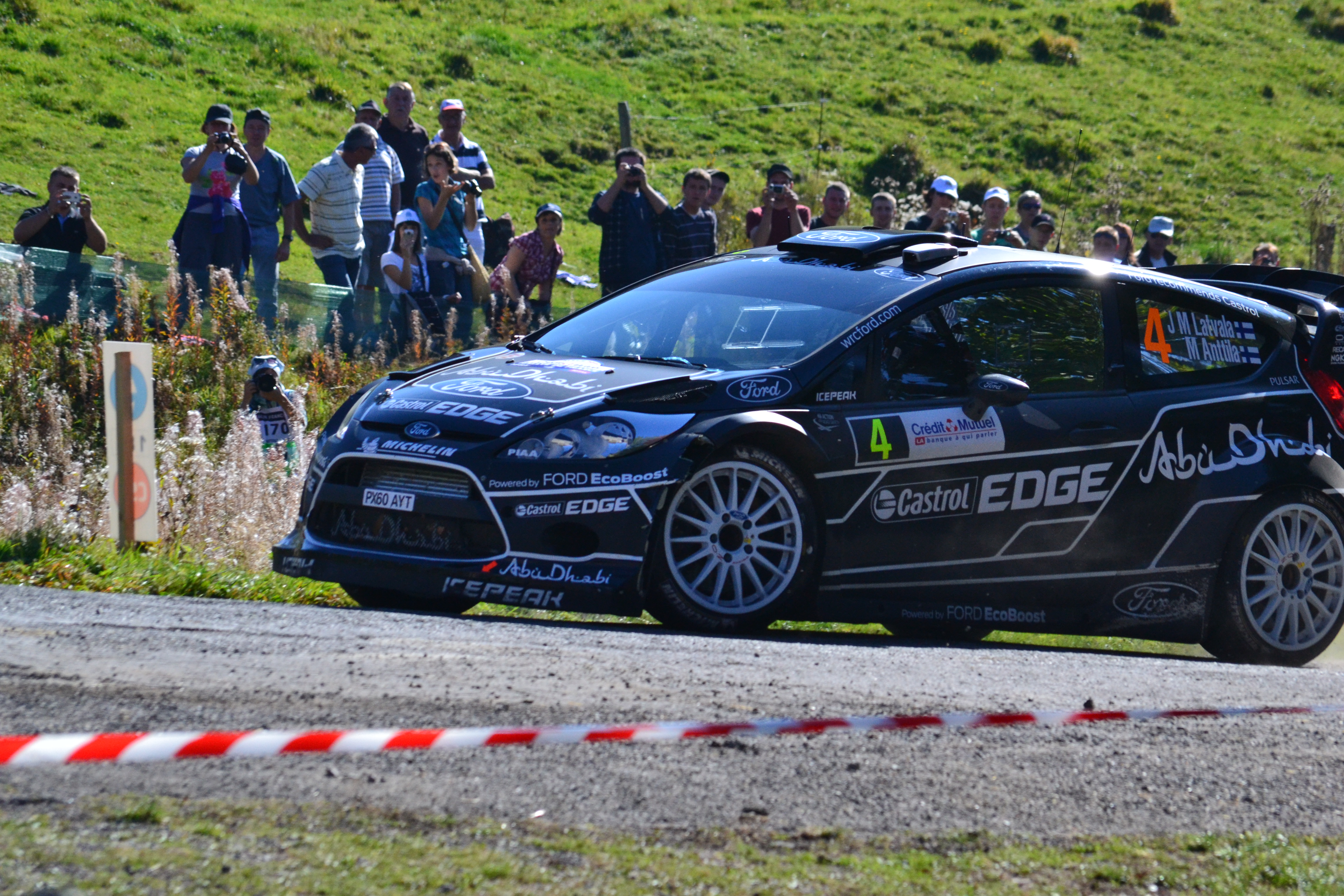 Rallye WRC France 2011, ES12 Grand Ballon. Ford Fiesta RS WRC - Jari-Matti Latvala/M. Anttila